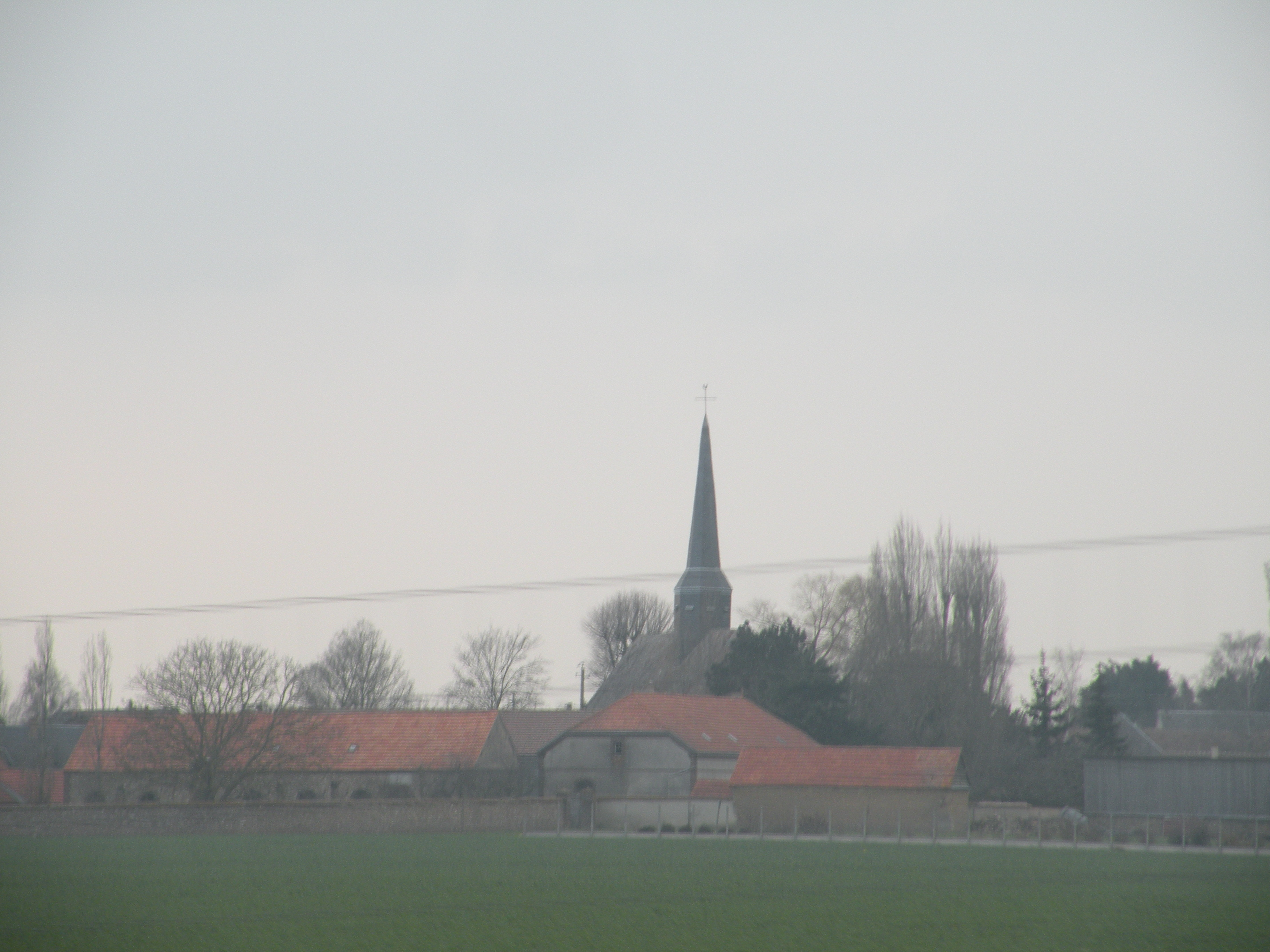 Ermenonville-la-Grande vue depuis l'autoroute A11.